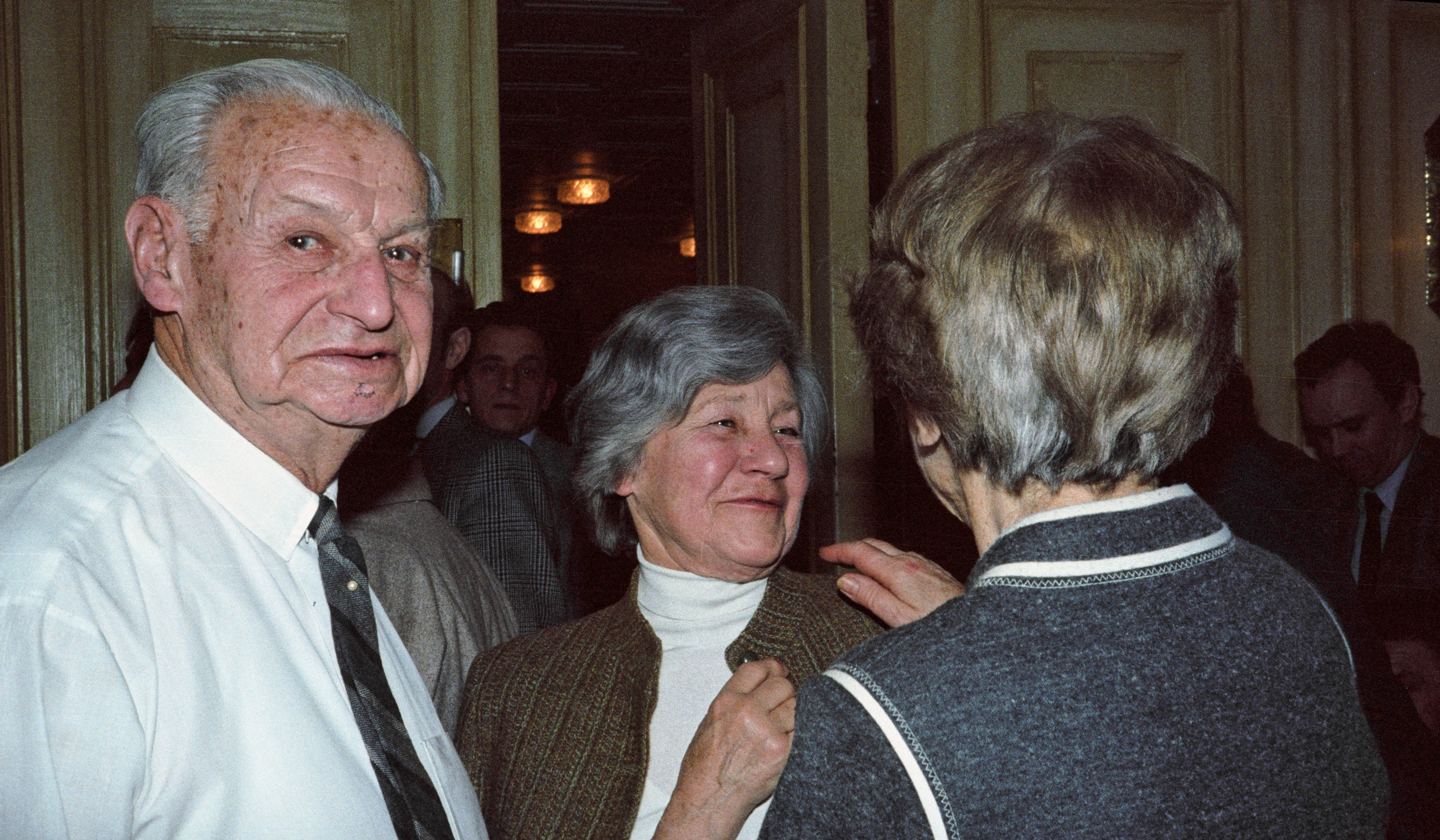 Begegnung Ilse Elsner mit dem Ehepaar Weichmann auf dem SPD-Landesparteitag 1982 in Hamburg